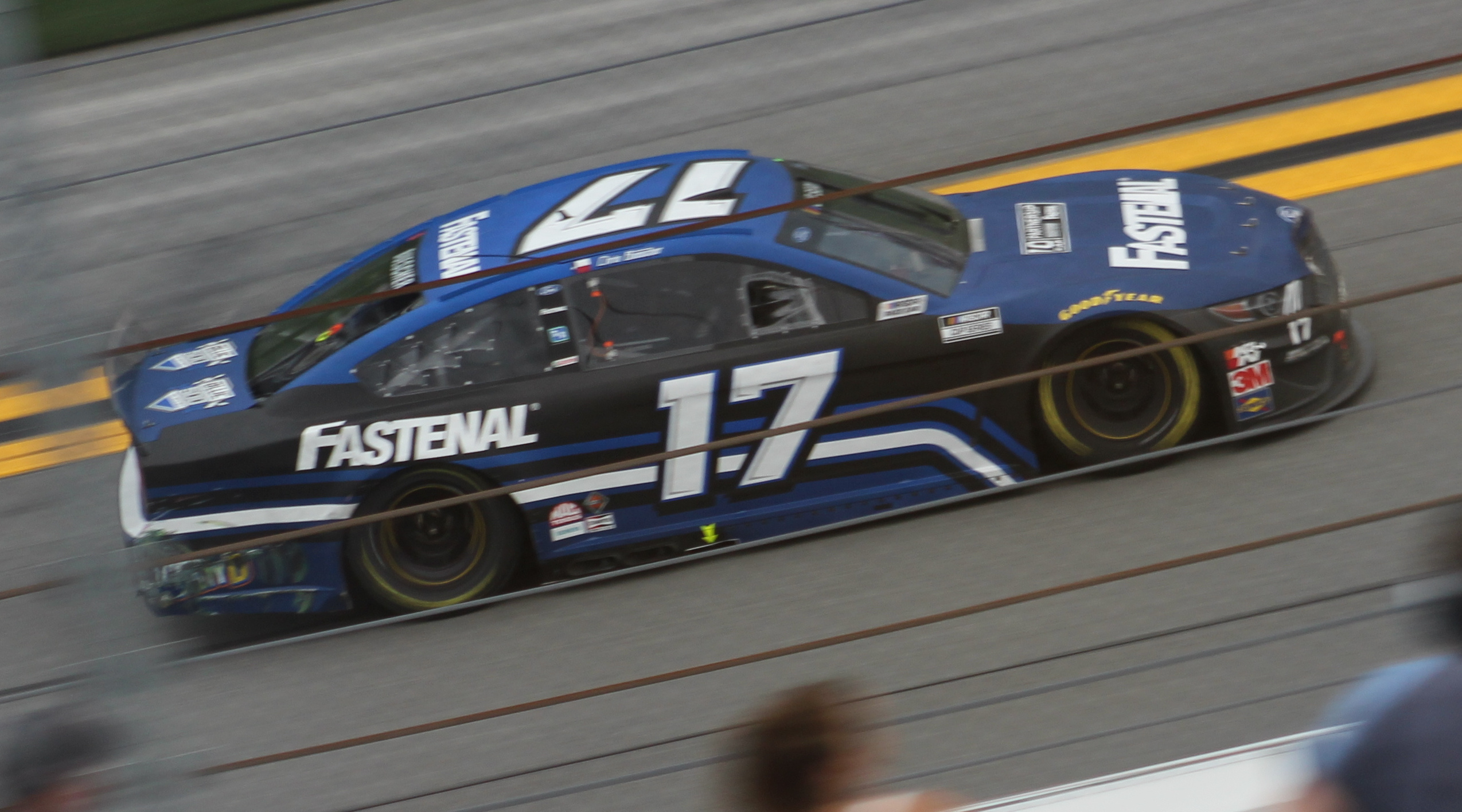 chris buescher